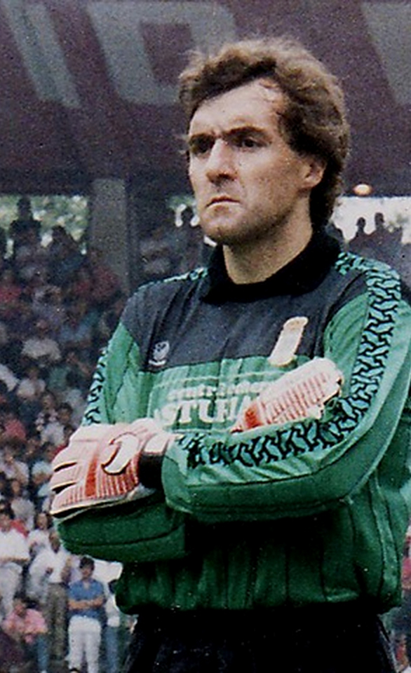 Sabino Zubeldia, Guardameta del Real Oviedo